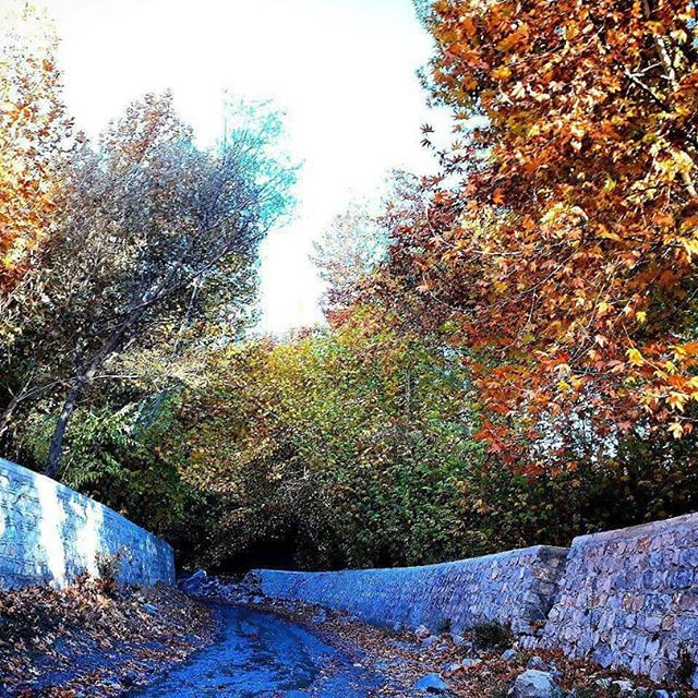 رودخانه بوکا، شهرستان بن